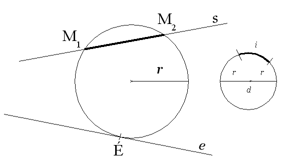 Kör